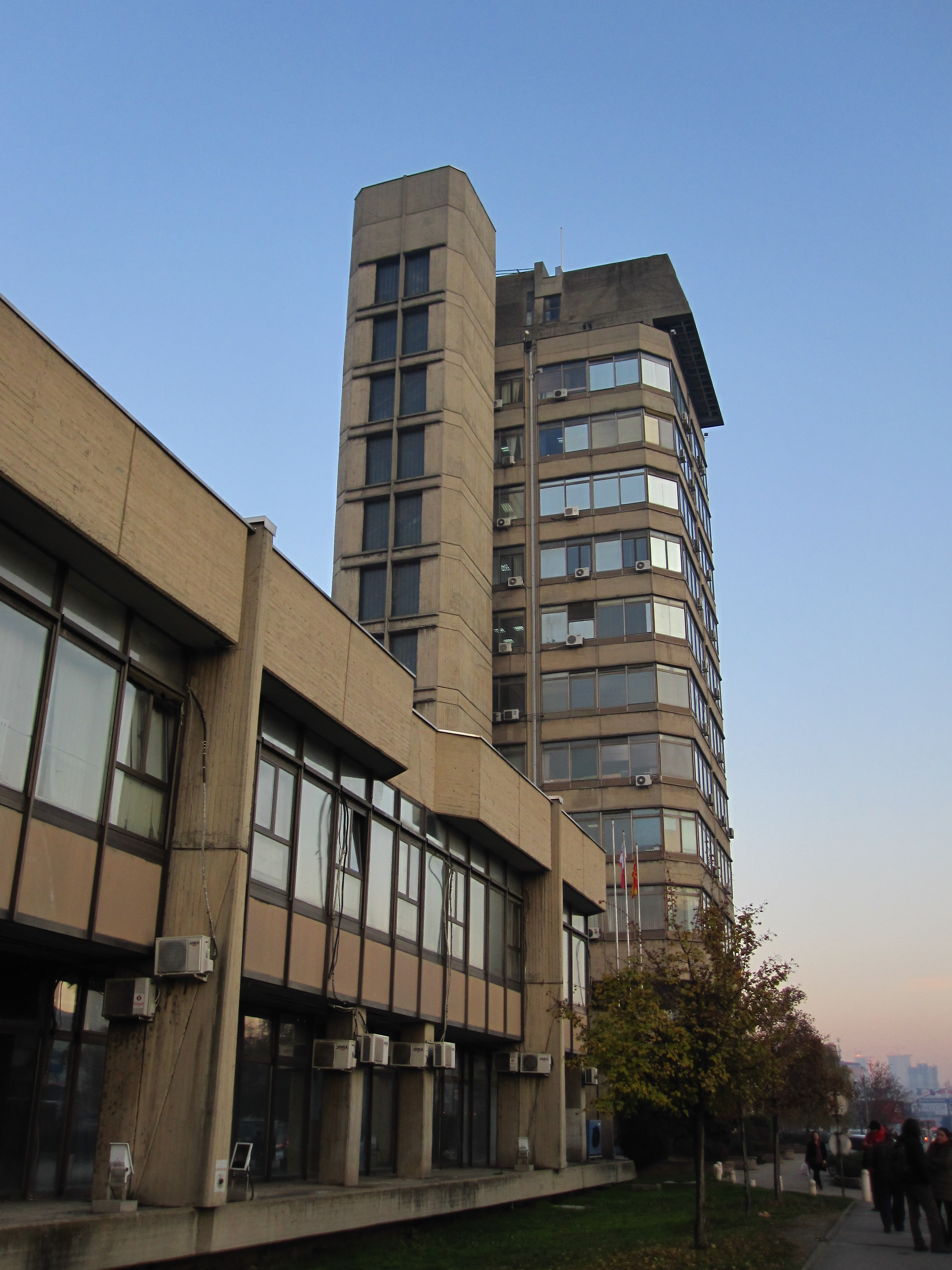 Народна банка на Република Македонија - Скопје